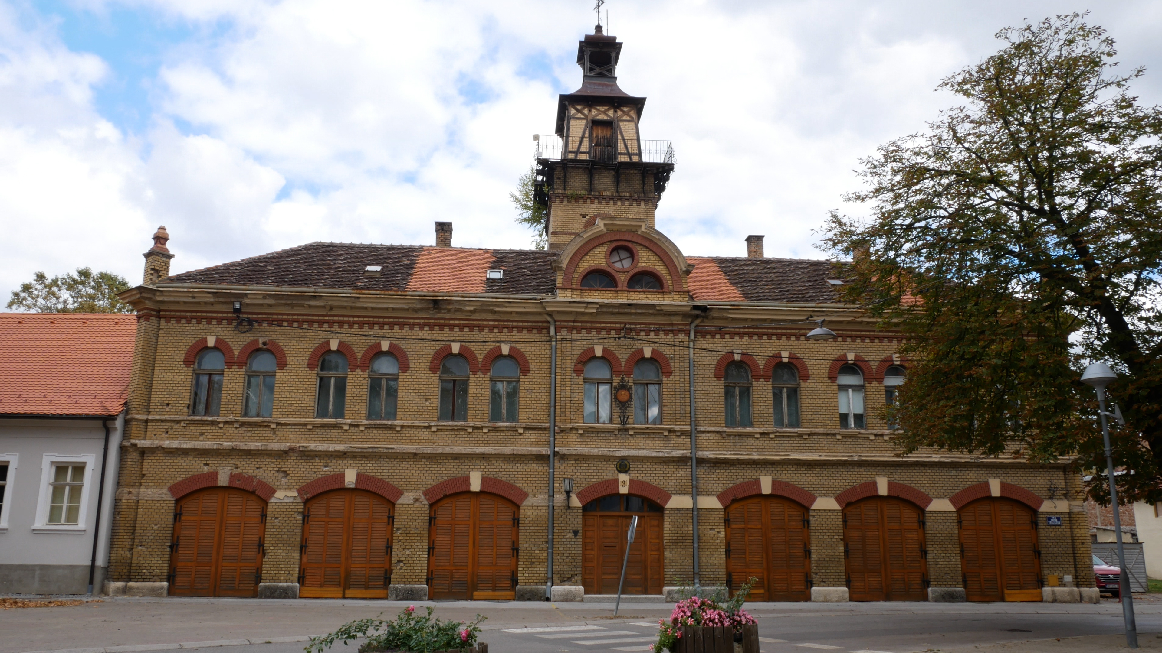 Vatrogasni muzej u Slavonskom Brodu